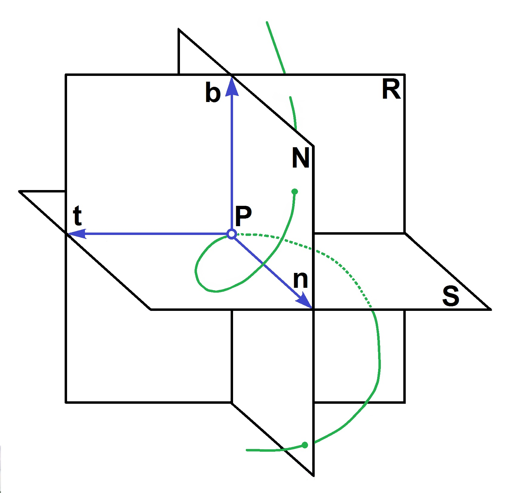 Триедър на Френе: t - тангенциальна (допирателна) права; n - главна нормала; b - бинормала; S - оскулачна равнина; N - нормална равнина; R - ректифицироща равнина.